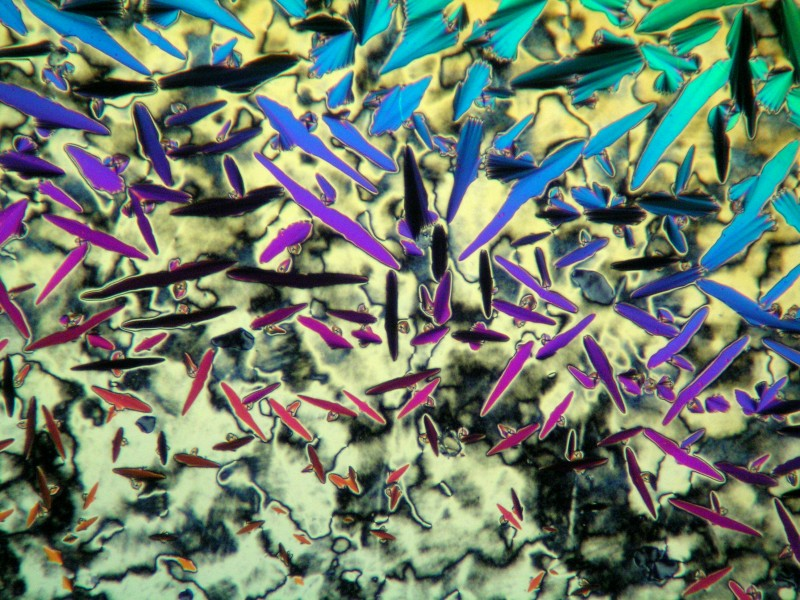 Polarisationsmikroskopische Aufnahme eines Flüssigkristalls am Phasenübergang nematisch - SmC; zu sehen sind Bâtonnets (längliche Keime der SmC-Phase), welche in die Schlierentextur einer nematischen Phase wachsen.